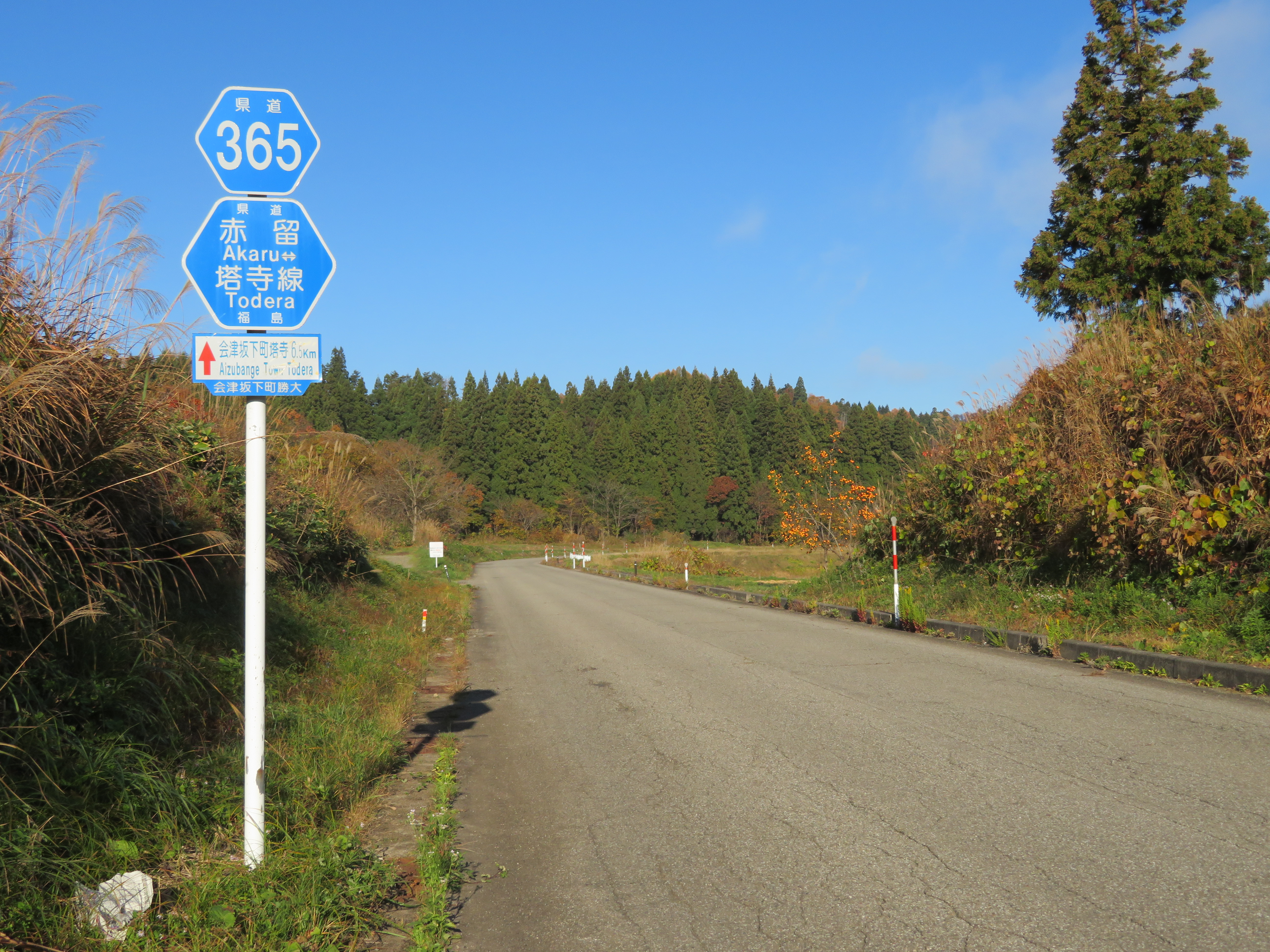 福島県道365号線会津坂下町勝大付近塔寺方面を撮影 Canon PowerShot SX720 HS